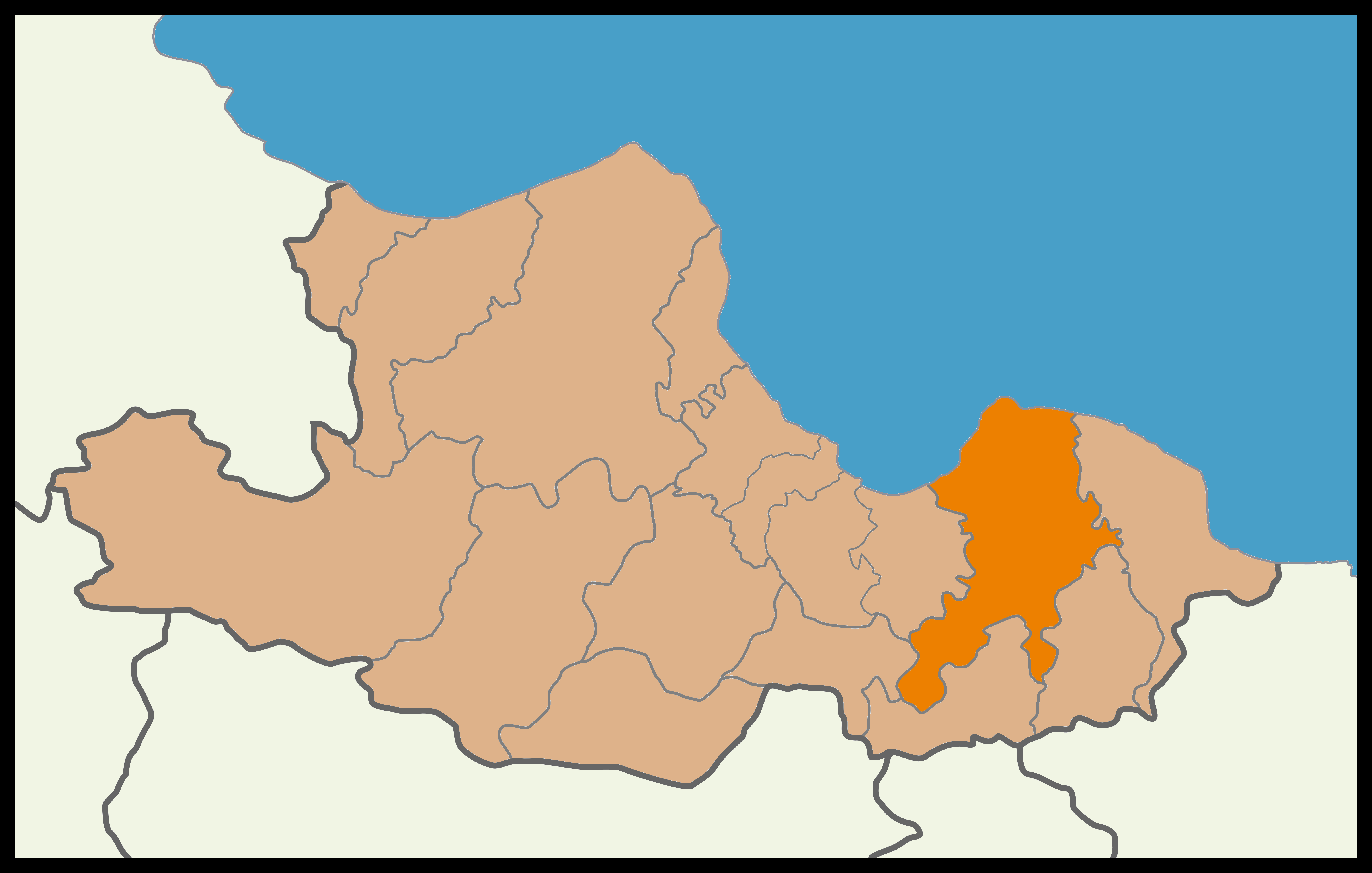 Samsun'un Çarşamba ilçesinin 2015 Türkiye genel seçimleri haritası.